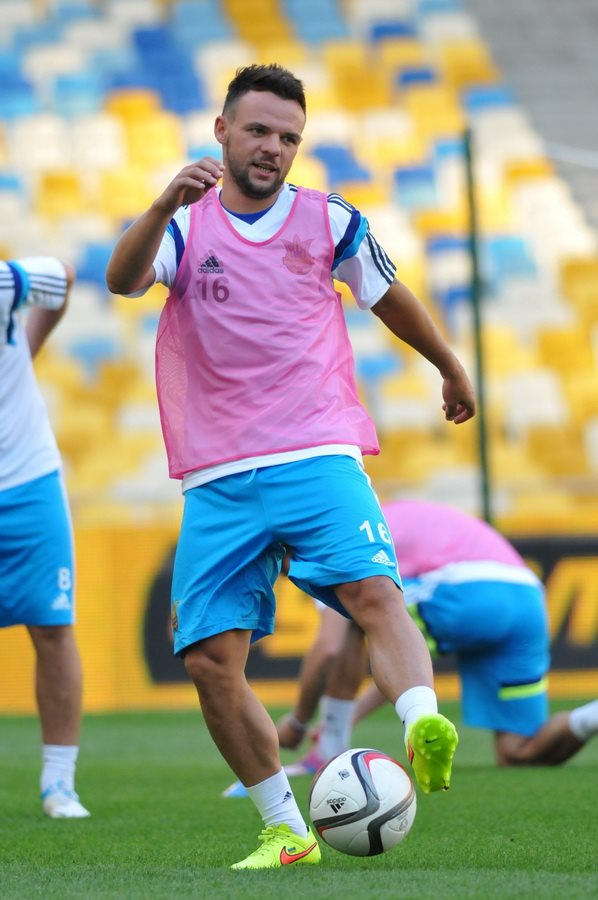 Тренировка сборной Украины